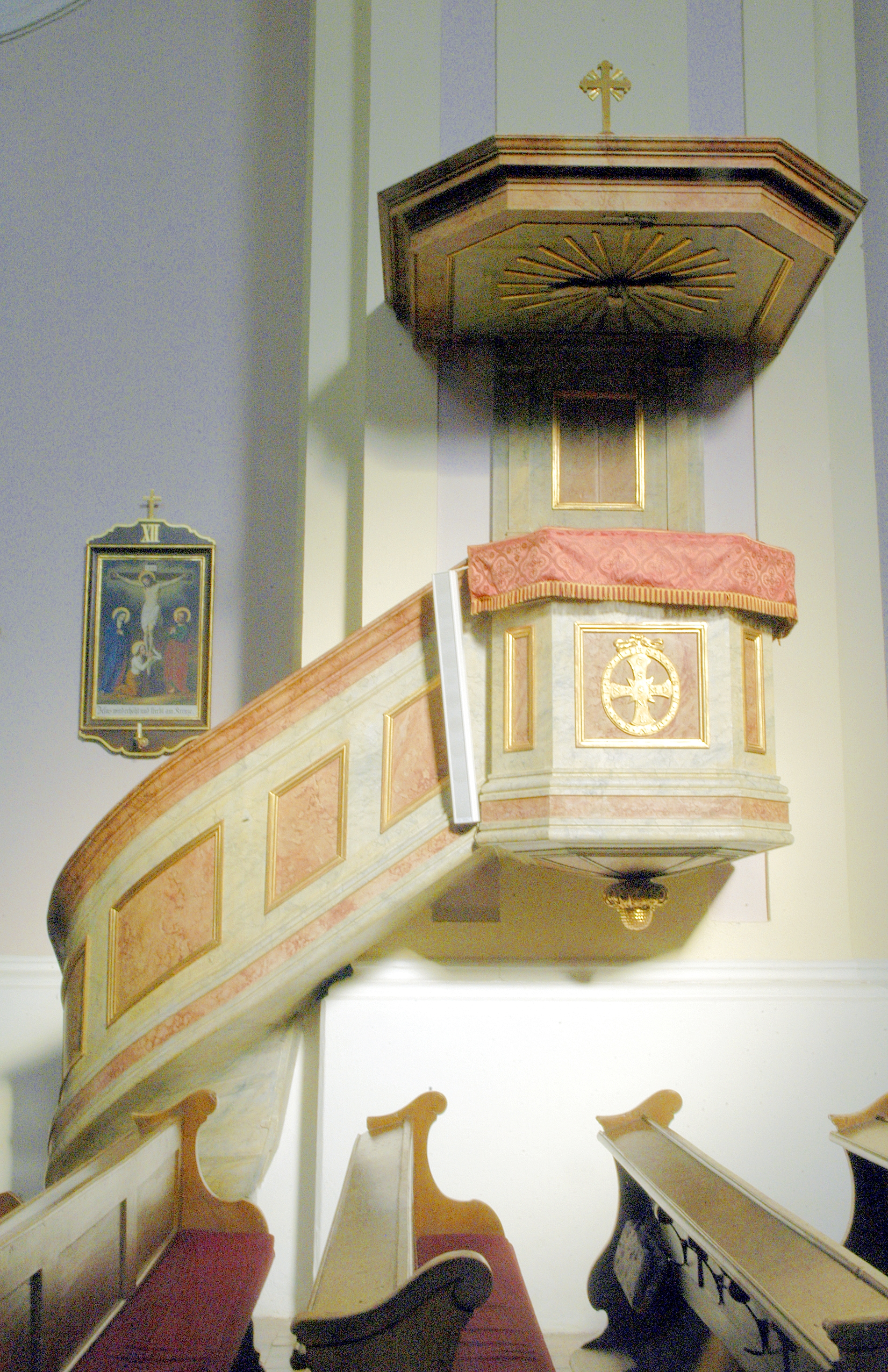 katholische Pfarrkirche heiliger Ulrich / Kanzel